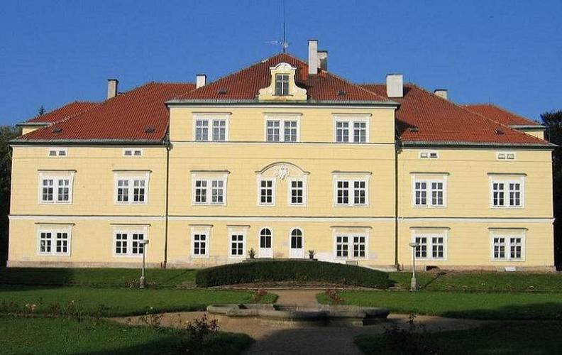 Miletín, okres Jičín. Zámek.